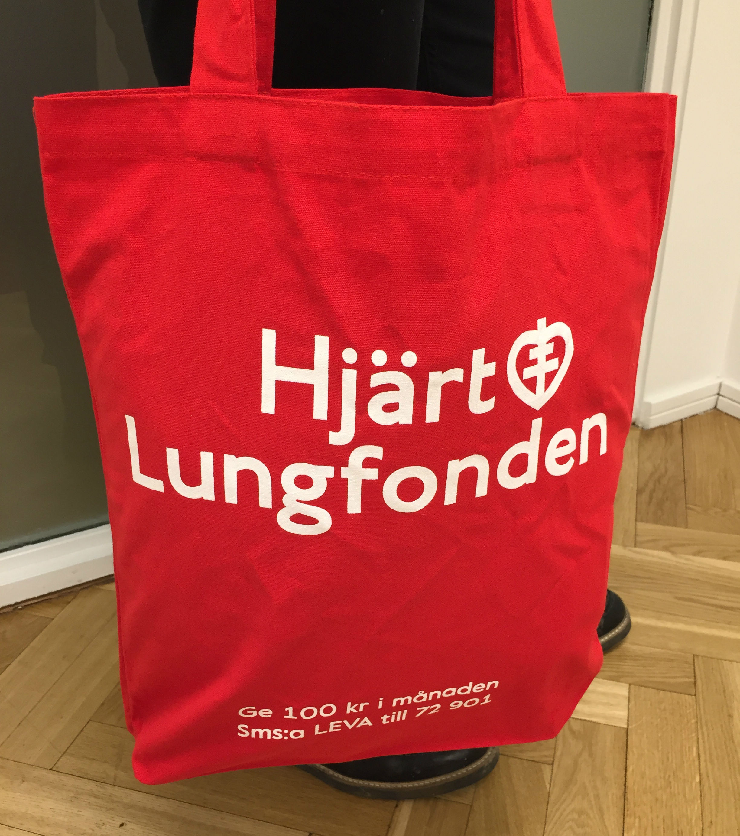 Tygpåse med Hjärt-Lungfondens symbol.